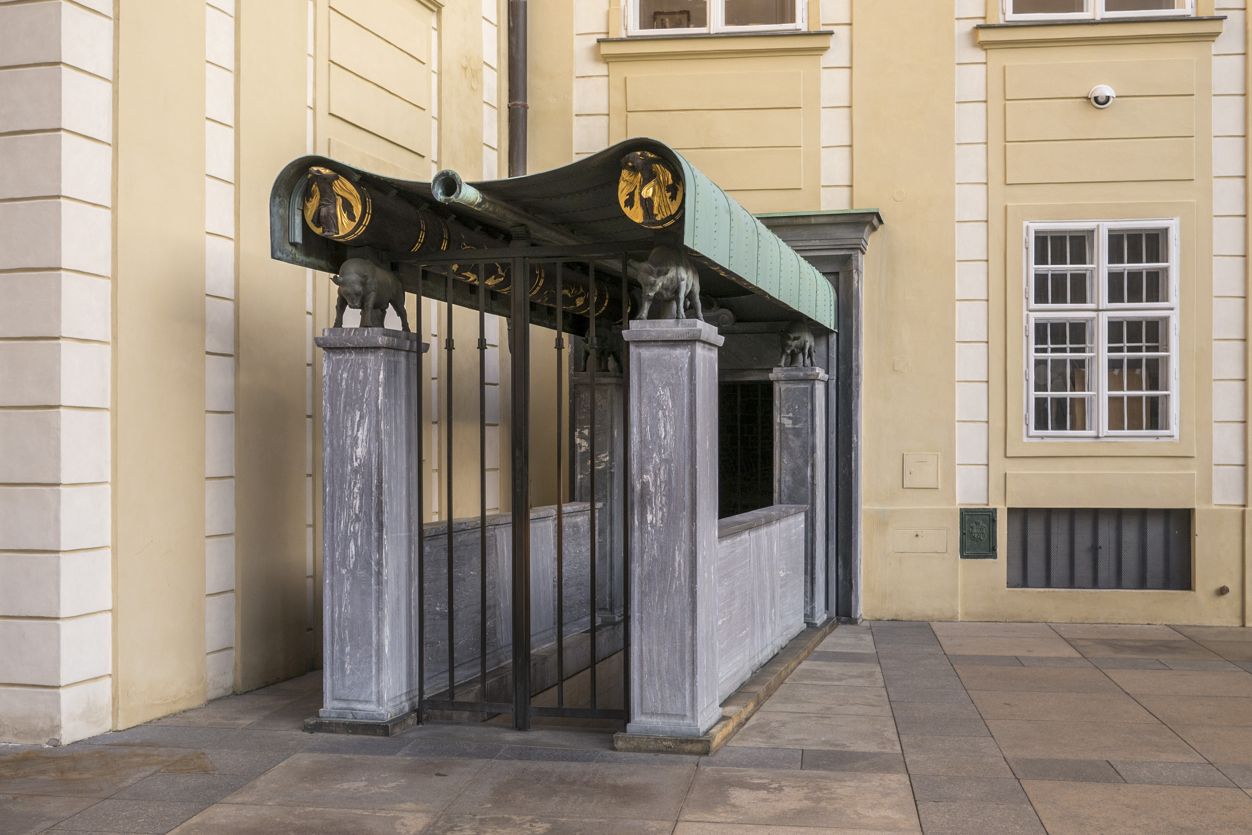 Prager Burg Stiegenabgang Joze Plecnik